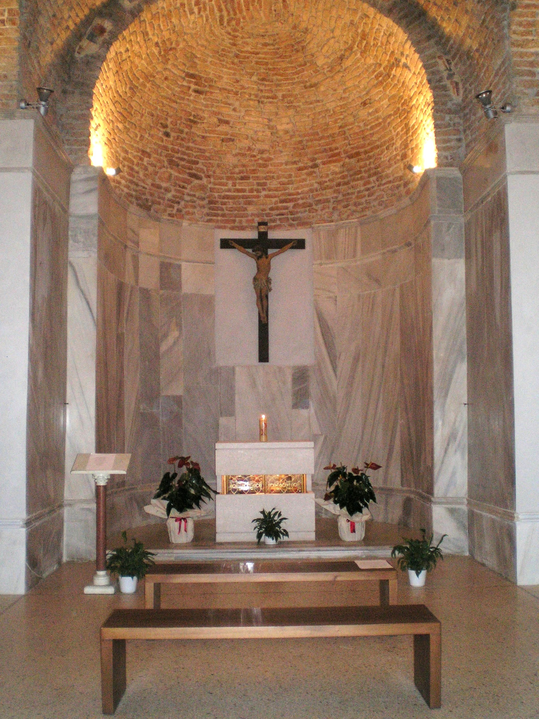 Torre campanile della Basilica dei santi Felice e Fortunato (Vicenza) OLYMPUS DIGITAL CAMERA